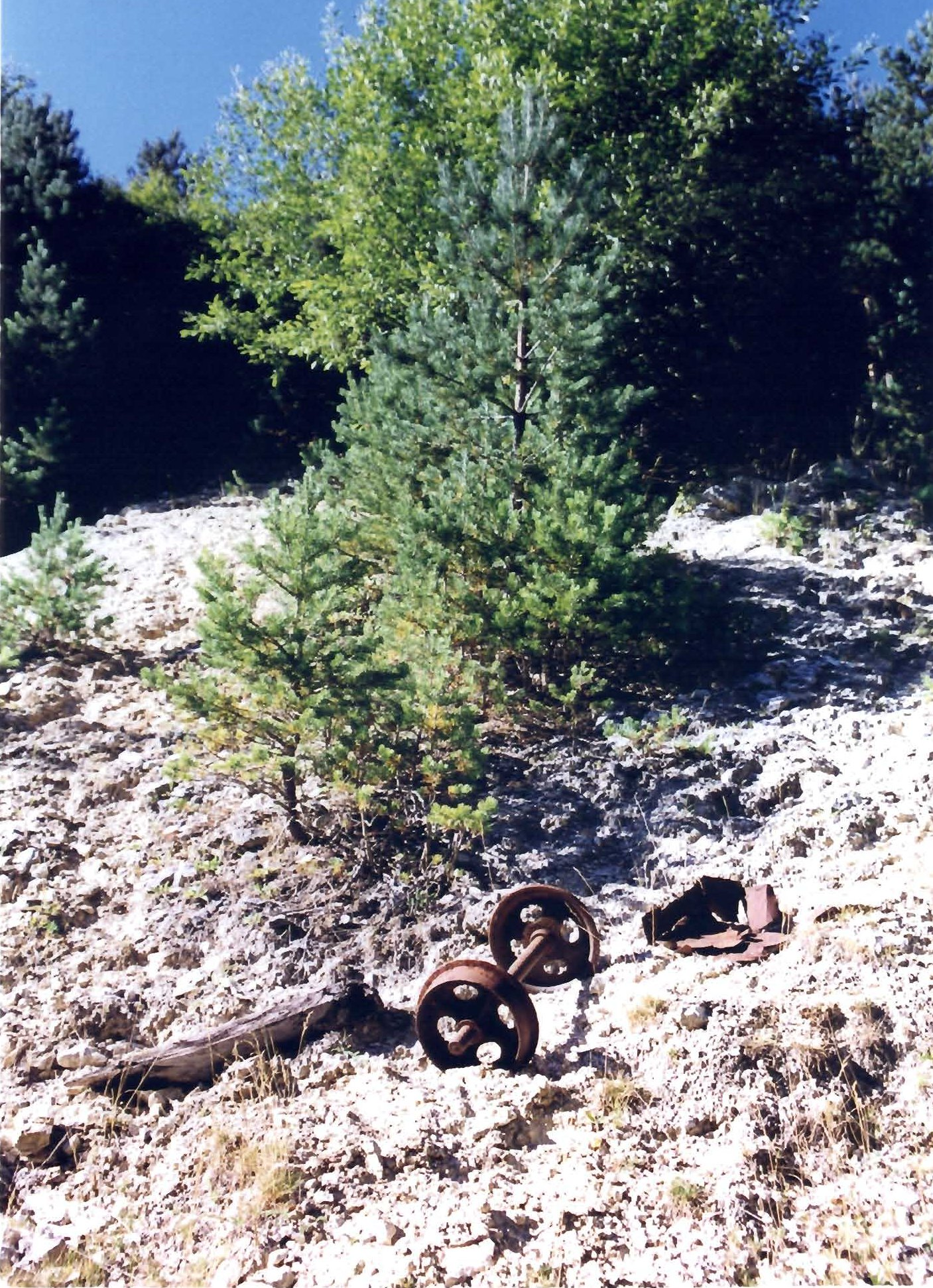 Imagen antigua explotación minerade talco en el pinar de Lillo